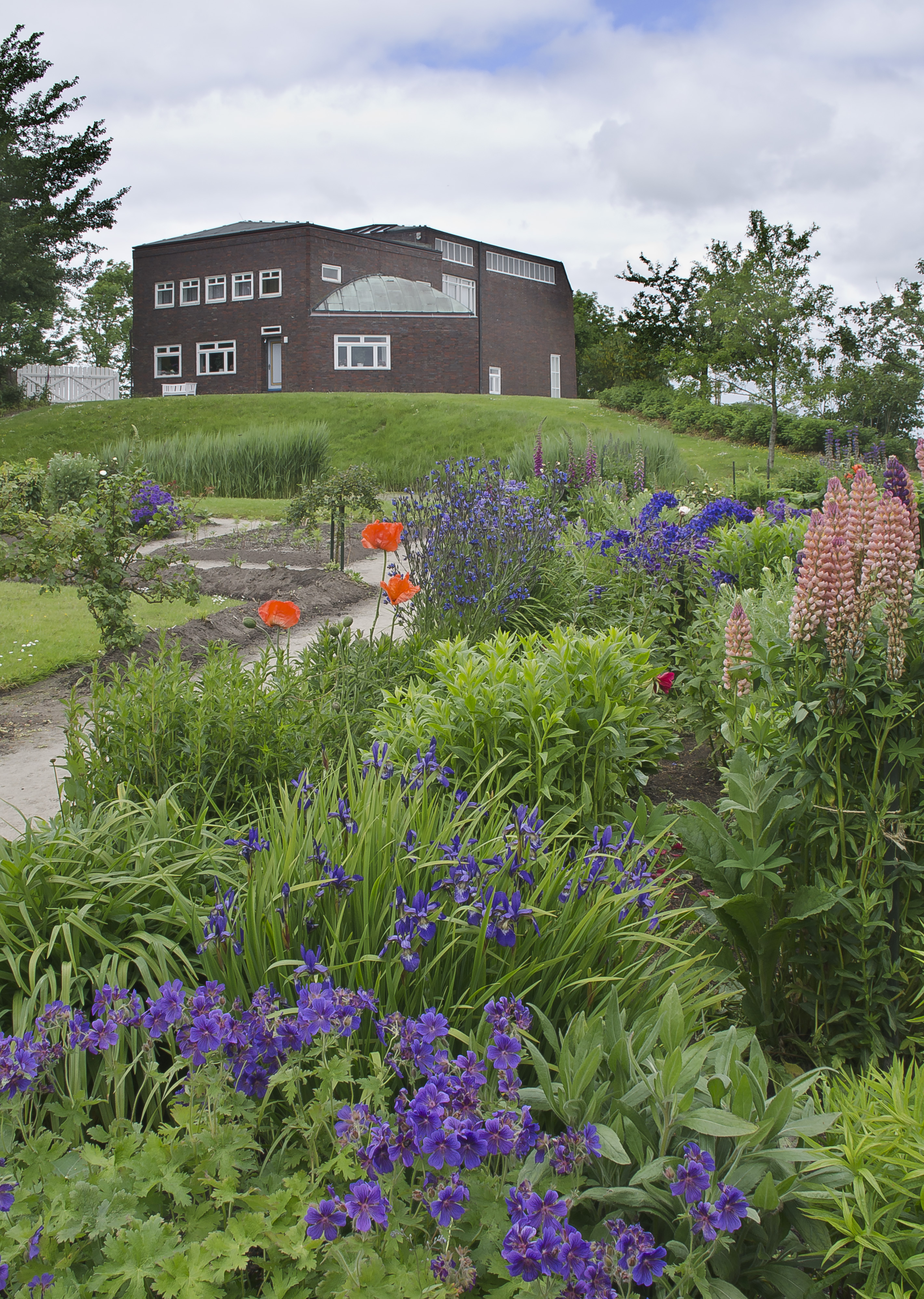 Haus Seebüll und Garten, Gemeinde Neukirchen, Schleswig-Holstein